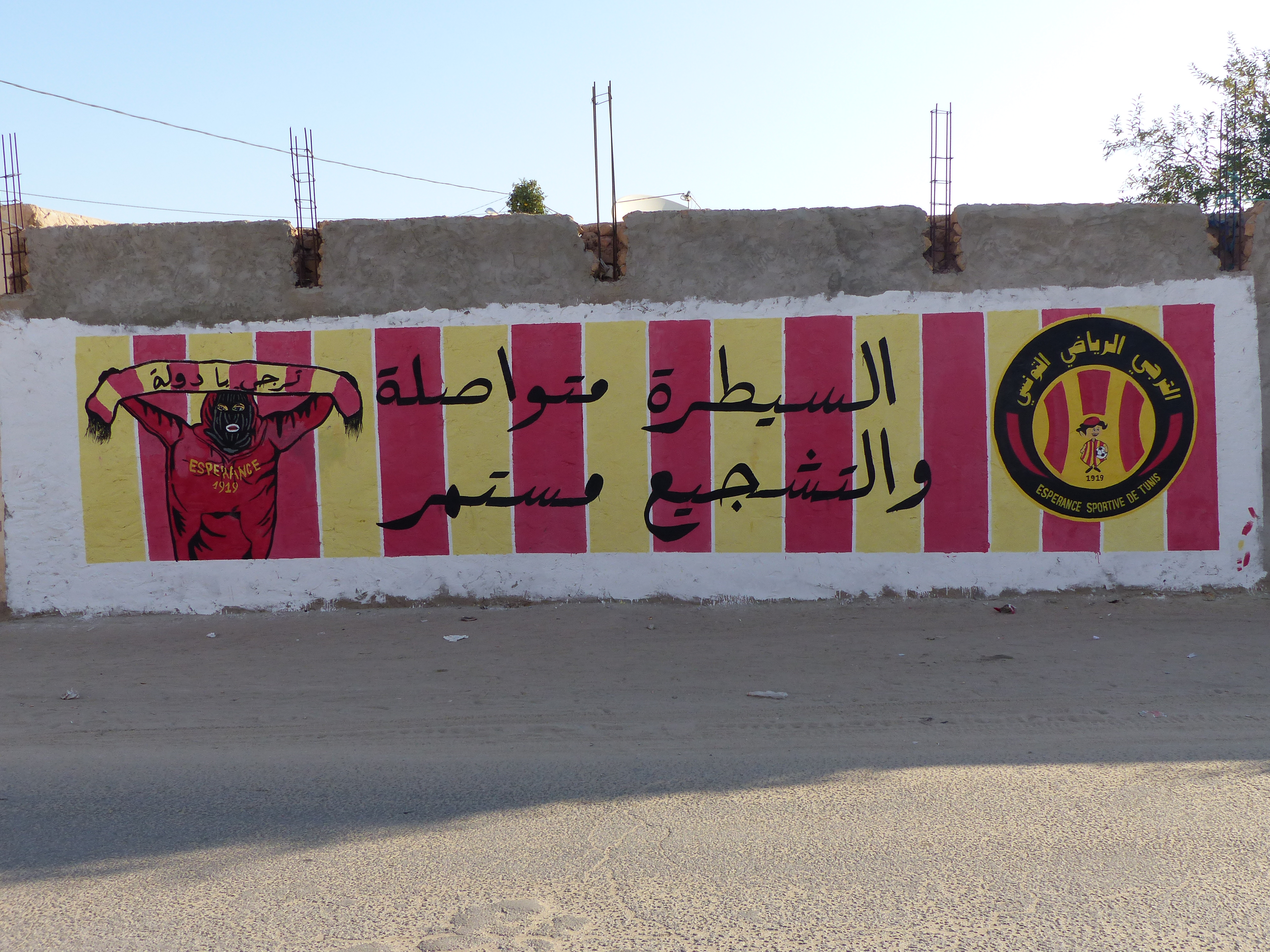 Graffiti sur le stade de Tozeur